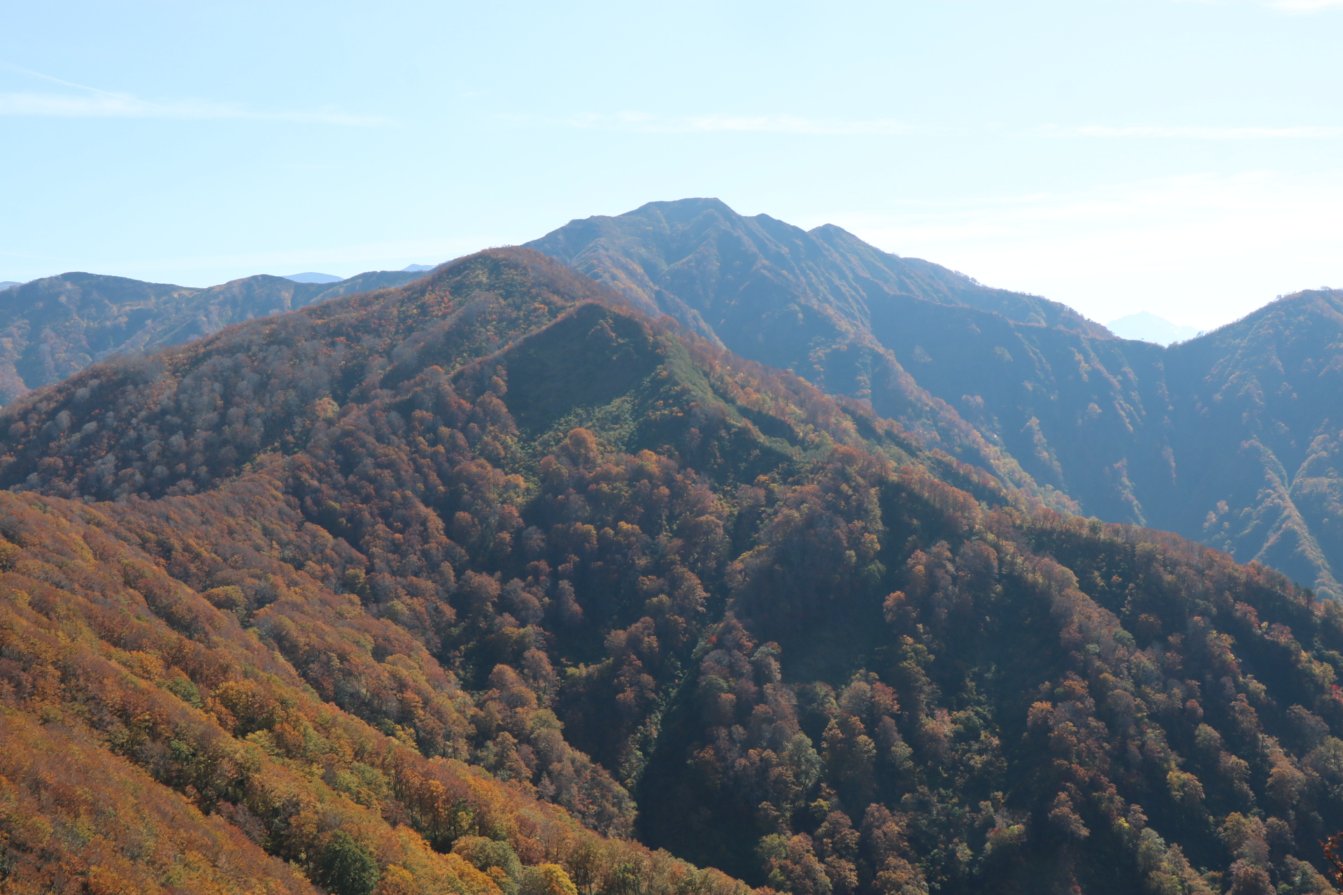 犬ヶ岳(中央奥)を北から望む。下駒ヶ岳から撮影。